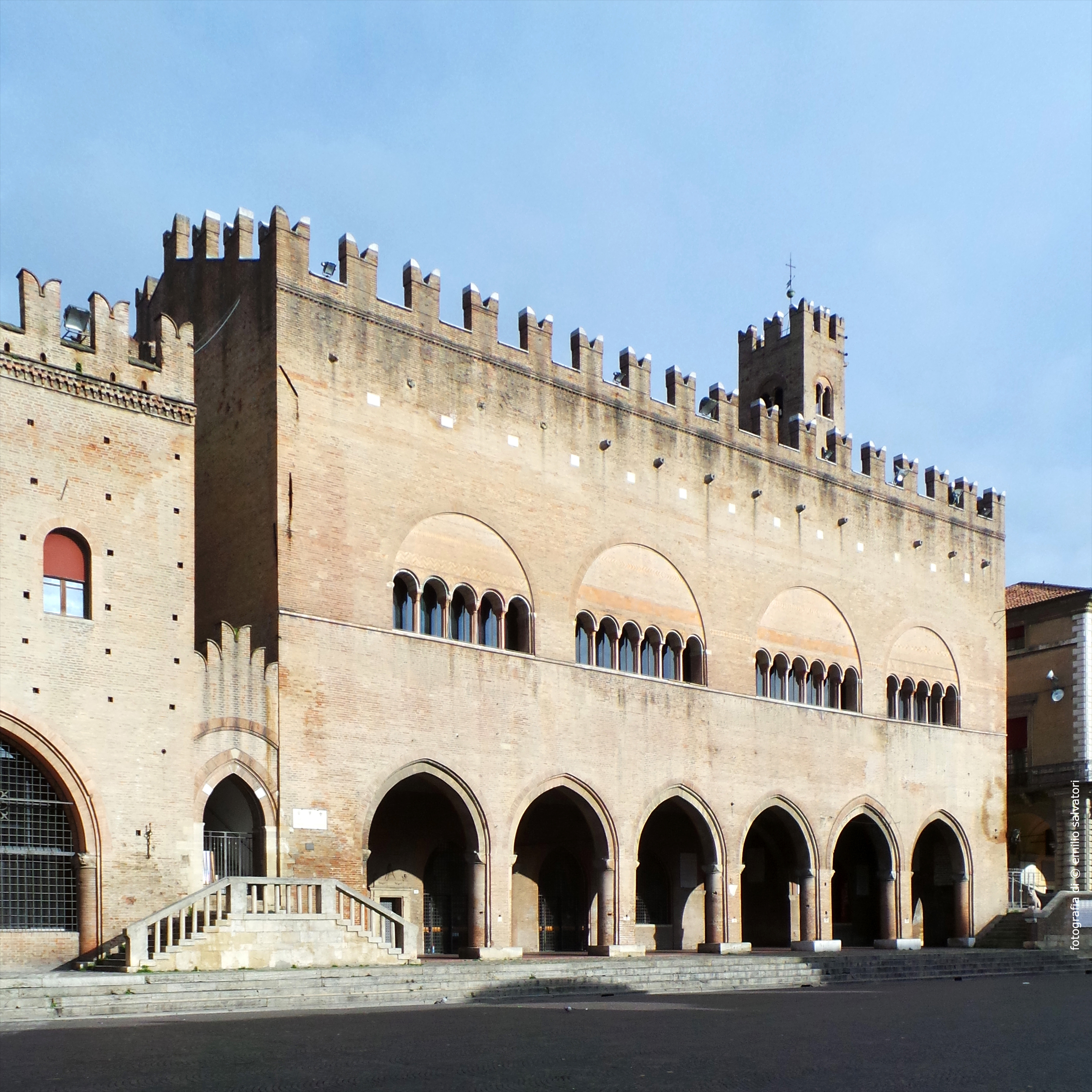 Palazzo dell'Arengo This is a photo of a monument which is part of cultural heritage of Italy.